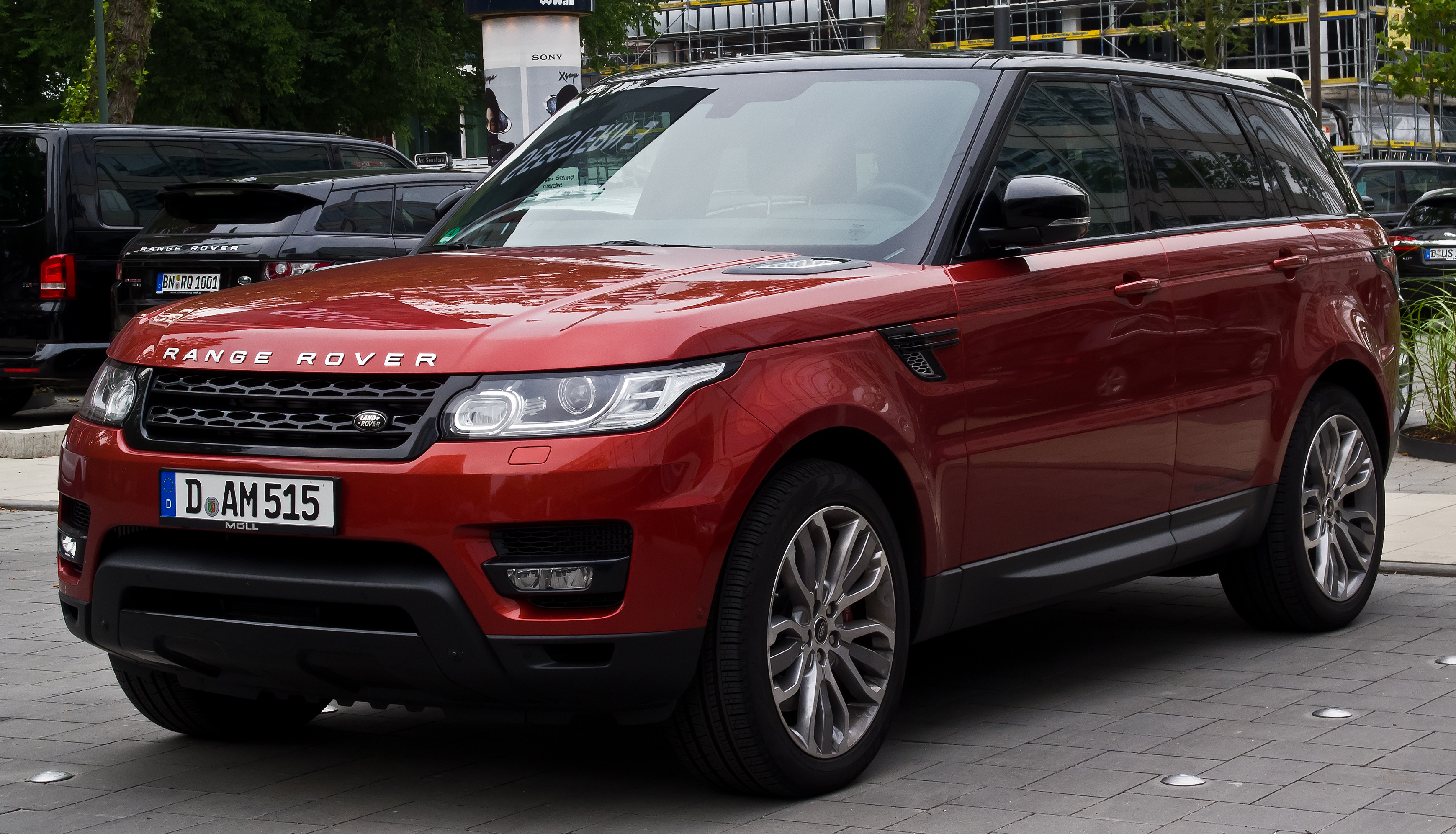 Range Rover Sport SDV6 HSE (II)